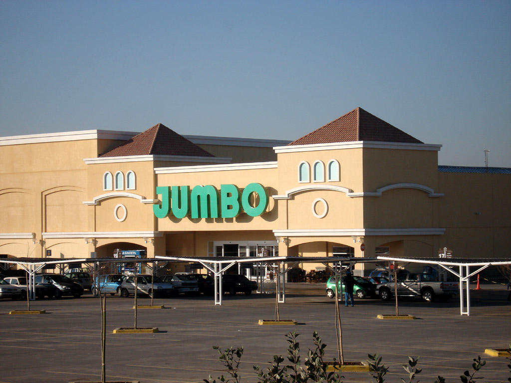 Hipermercado Jumbo Portal Tucumán, Tucumán, Argentina